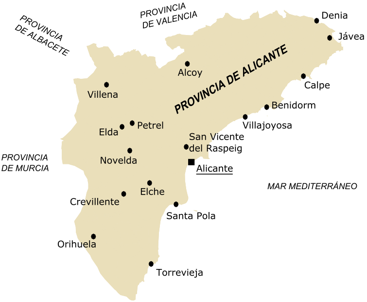 Mapa de la provincia de Alicante donde aparecen las ciudades de más de 25.000 habitantes según el censo del 2005. Realizado por Rodriguillo a partir de Alicante - Mapa municipal.svg